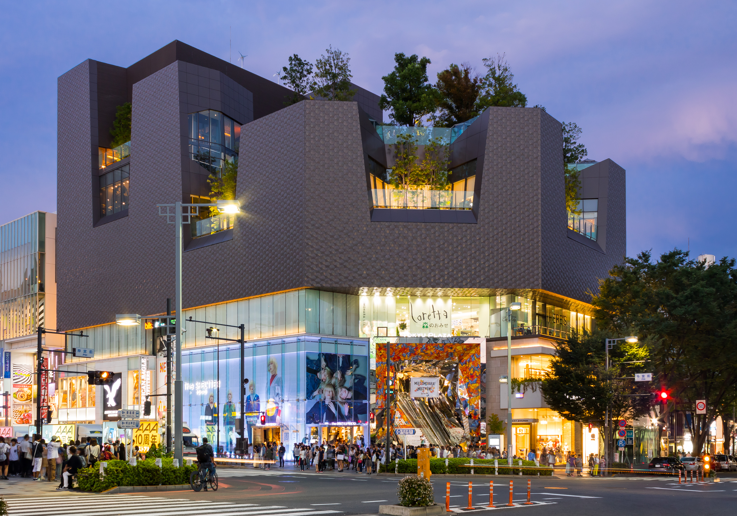 東急プラザ表参道原宿店